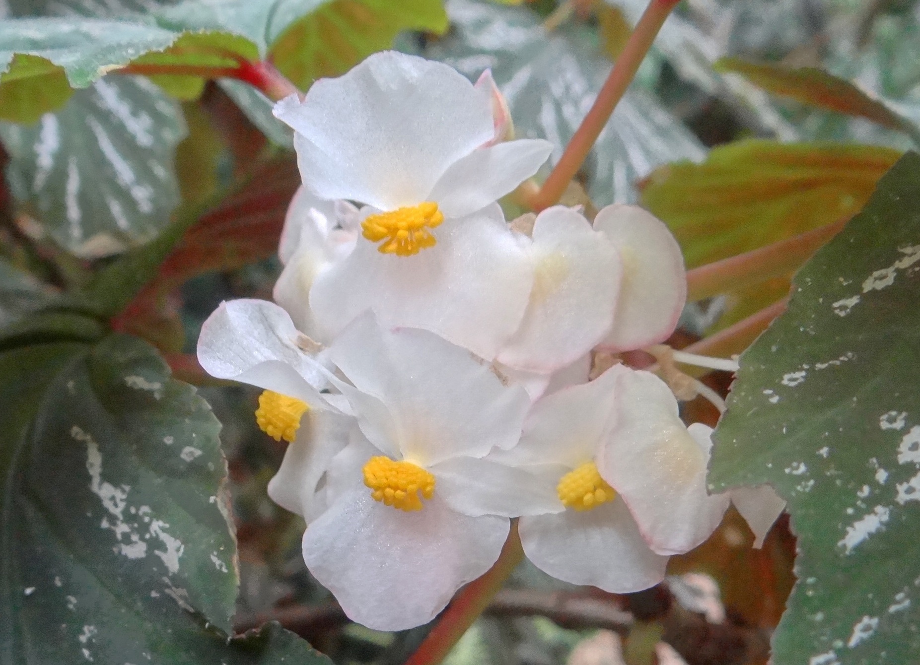 Begonia aconitifolia. Location: Poland Botanical Garden, Łódź